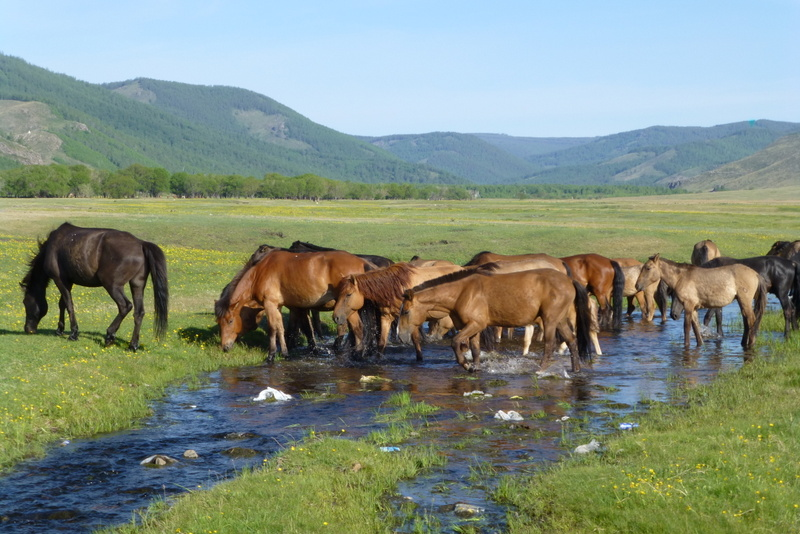 Mongolei Pferde